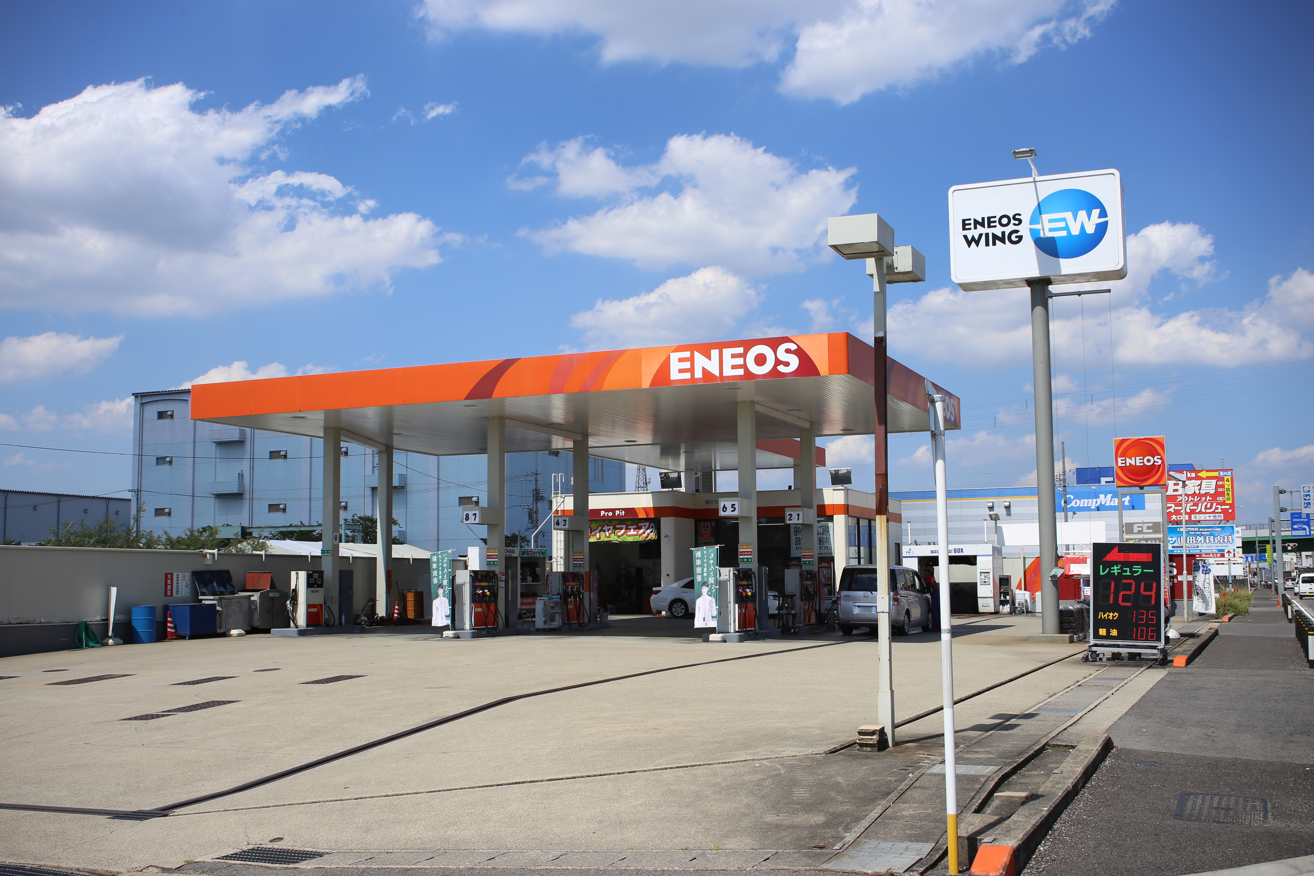 愛知県小牧市のENEOS WING 小牧インターSSを東側公道南側より撮影。ただし、ナンバープレートにつき画像処理済。